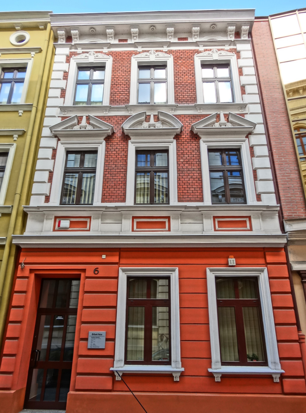 Kamienica przy ul. Jezuickiej 6 w Bydgoszczy